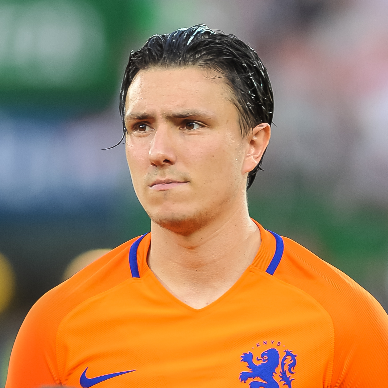 Wien, 4.6.2016, ÖFB Laenderspiel - Österreich vs Niederlande. Bild zeigt Steven Berghuis (NED).